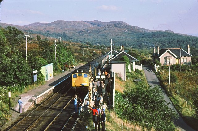 Arisaig station 1979